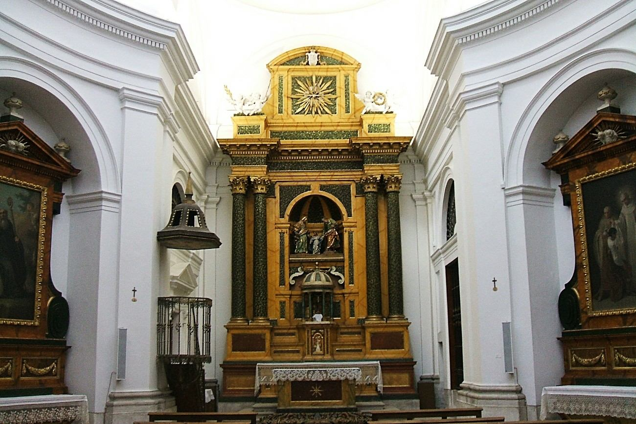 Iglesia neoclásica (siglo XVIII) del Real Monasterio de San Joaquín y Santa Ana (MM Cistercienses), en Valladolid, España/Spain